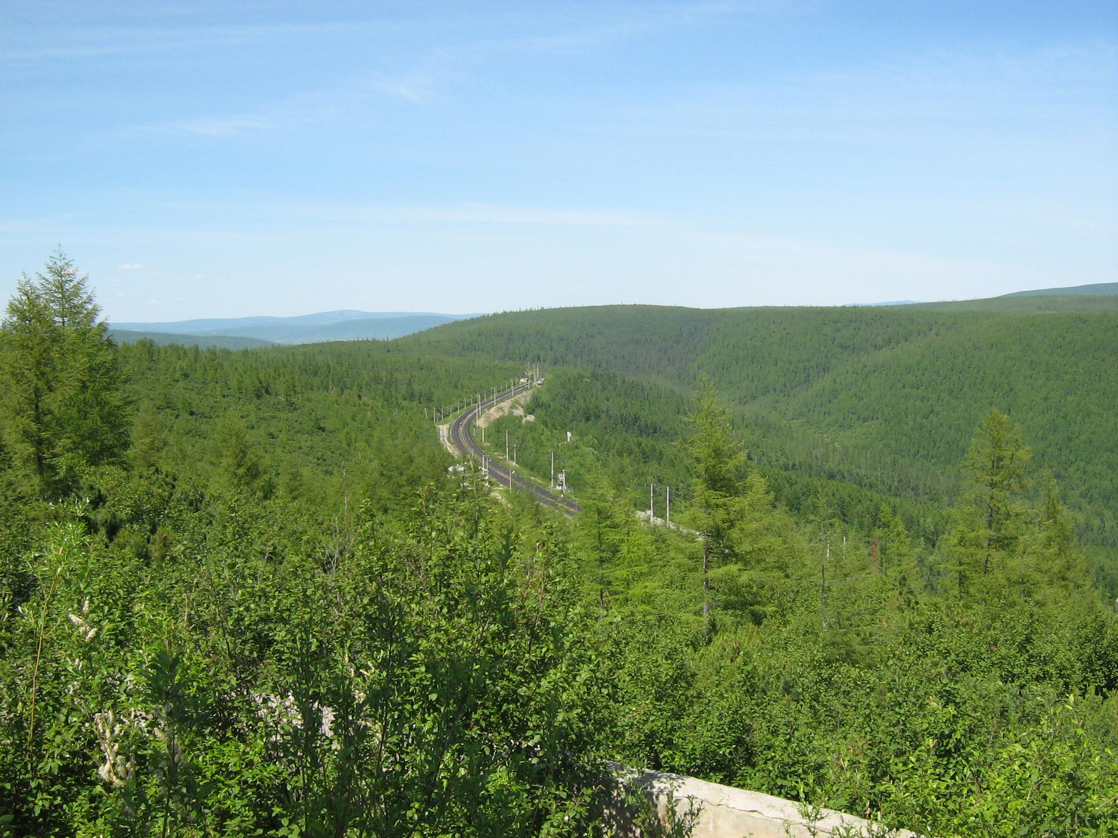 А также видна пересекающая его Амуро-Якутская железнодорожная магистраль. Автор: Светлана Иванова